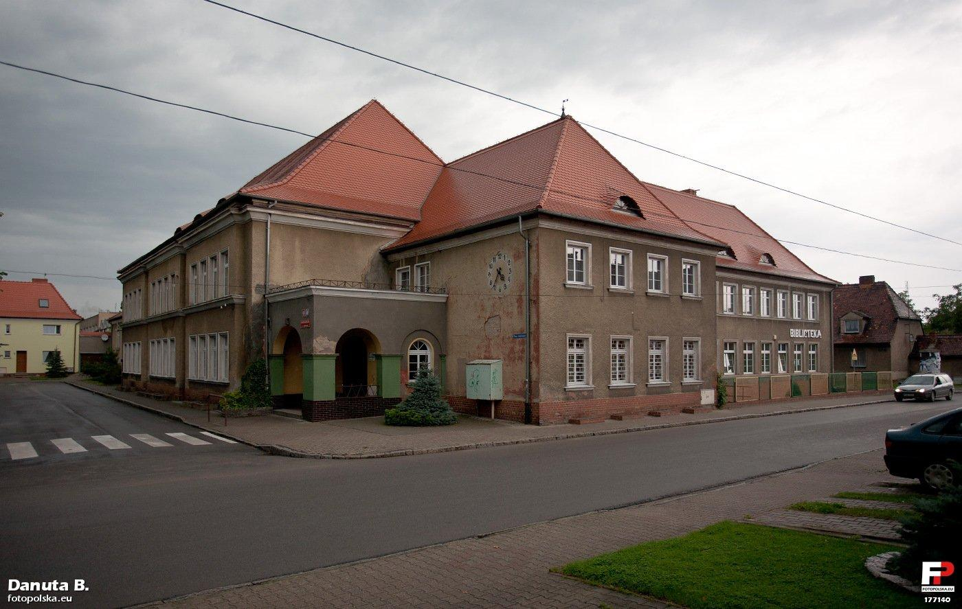 Budynek wzniesiony w 1925 r. Dziś mieści gimnazjum i bibliotekę dla mieszkańców miasta. Od strony podwórza wybudowano salę gimnastyczną, która służyła przed wojną również jako sala kinowa, bowiem wyposażona była w odpowiednią aparaturę. Przed zbudowaniem zboru, była też miejscem nabożeństw.